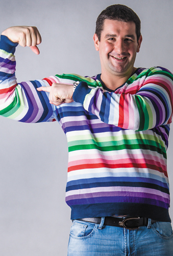 Андрей Рекечинский. Заслуженный мастер спорта. Серебряный призер Олимпийских игр (Сидней, 2000) и бронзовый призер Игр (Афины, 2004), обладатель Кубка мира, победитель Мировой лиги, победитель Игр доброй воли, многократный чемпион и обладатель Кубка России по водному поло. Фотография из серии «Лица эстафеты».